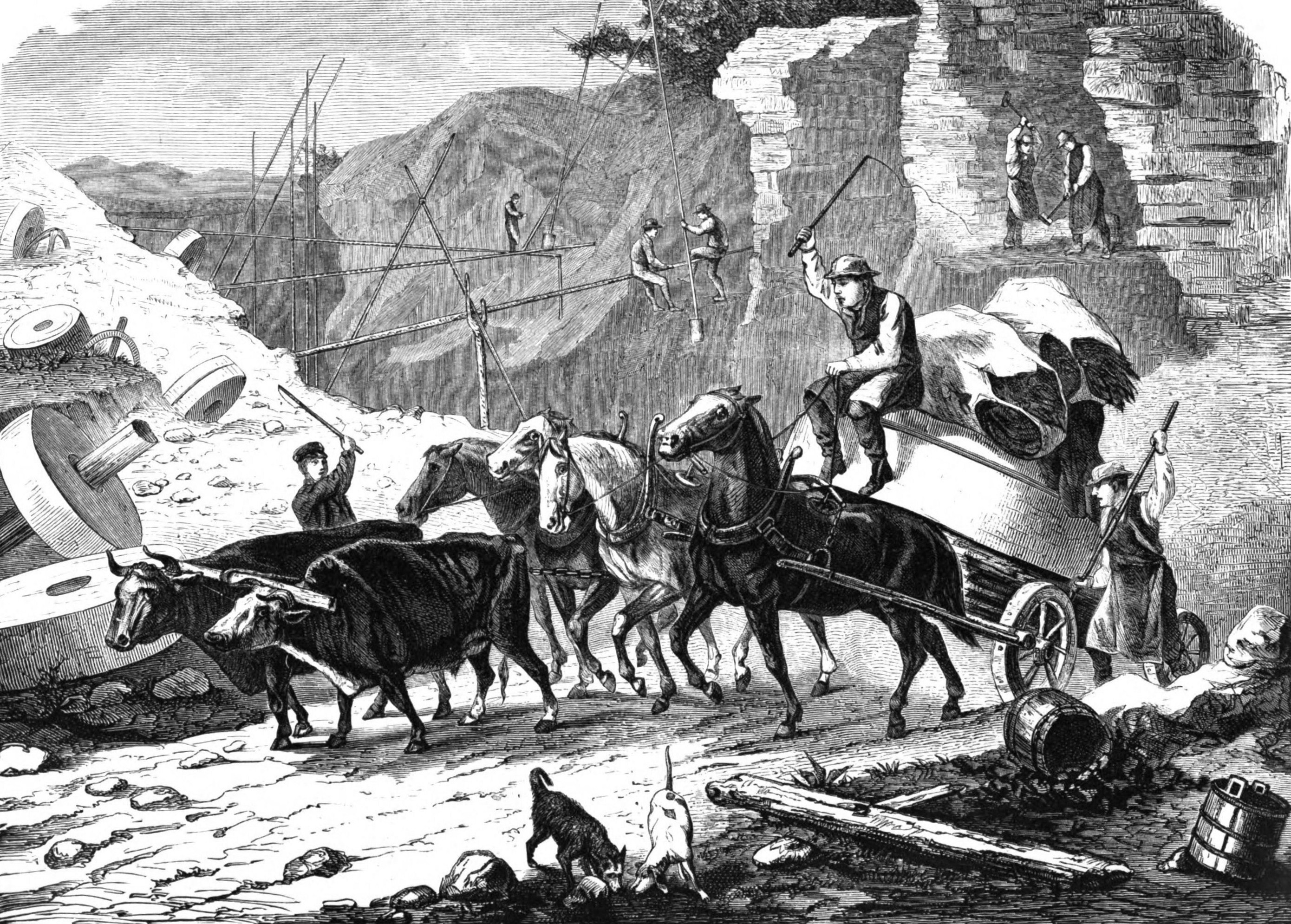 Lugnås stenbrott i Västergötland.